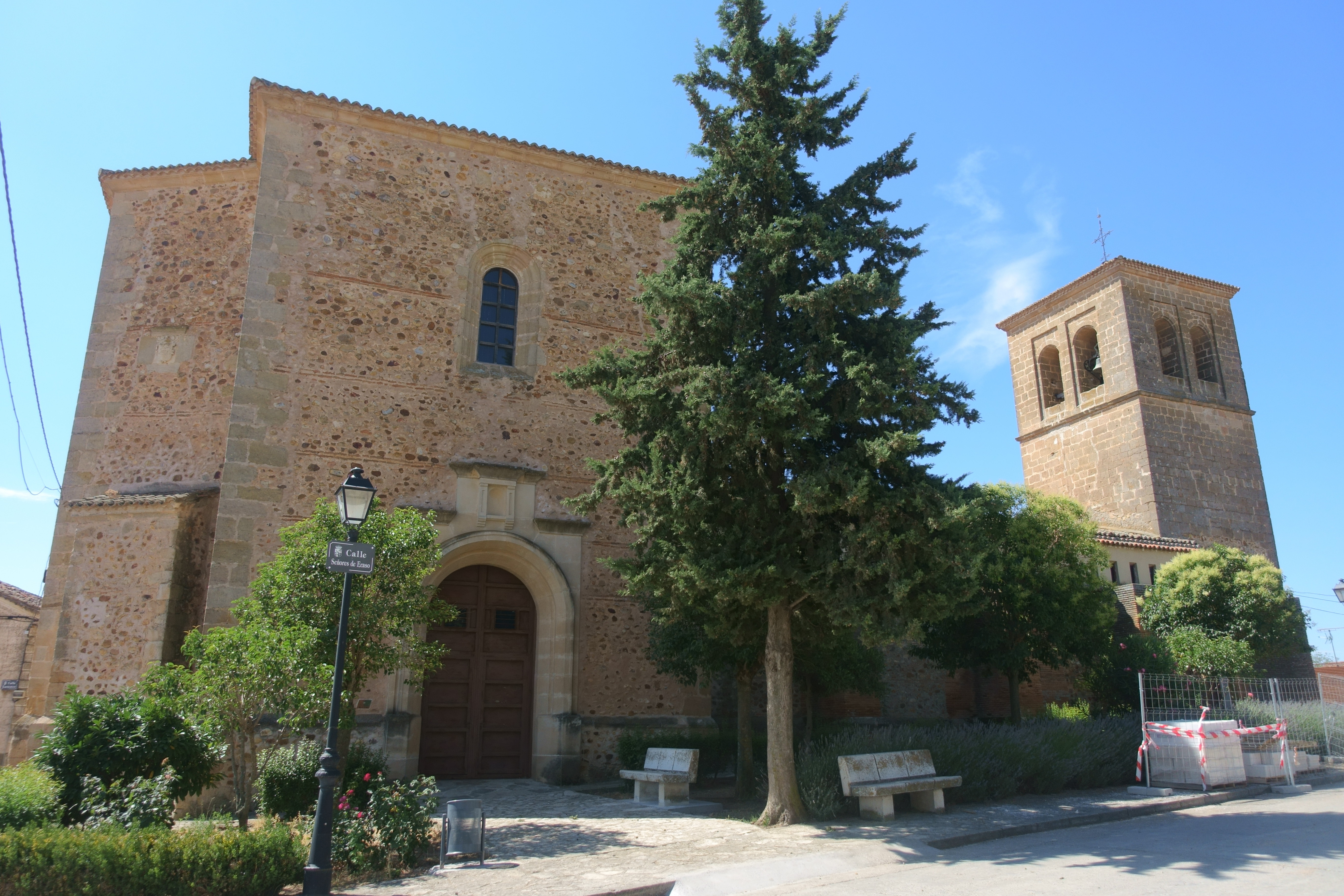 Iglesia de Nuestra Señora de la Luz Bella, Mohernando (Guadalajara, España).